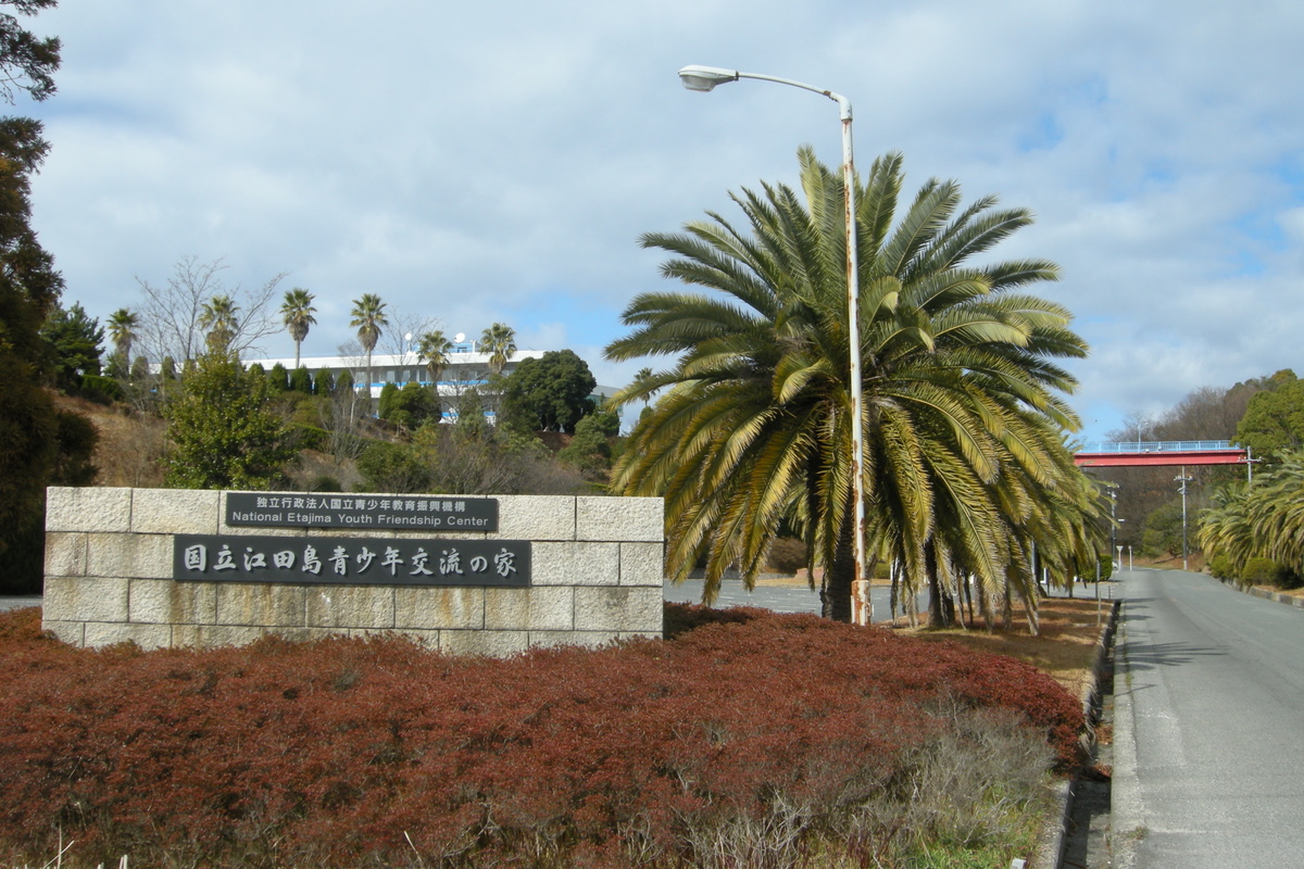 国立江田島青少年交流の家